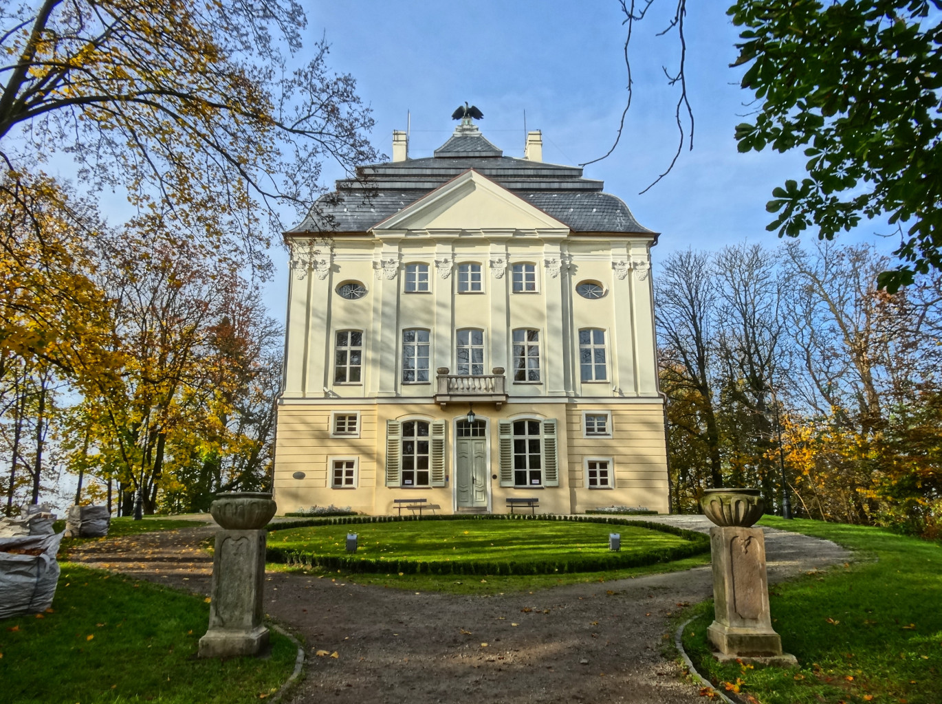 Barokowy pałac (poł. XVIII w.) w Ostromecku k. Bydgoszczy, zwany Starym zbudowany w stylu saskiego rokoka na polecenie wojewody pomorskiego Pawła Michała Mostowskiego